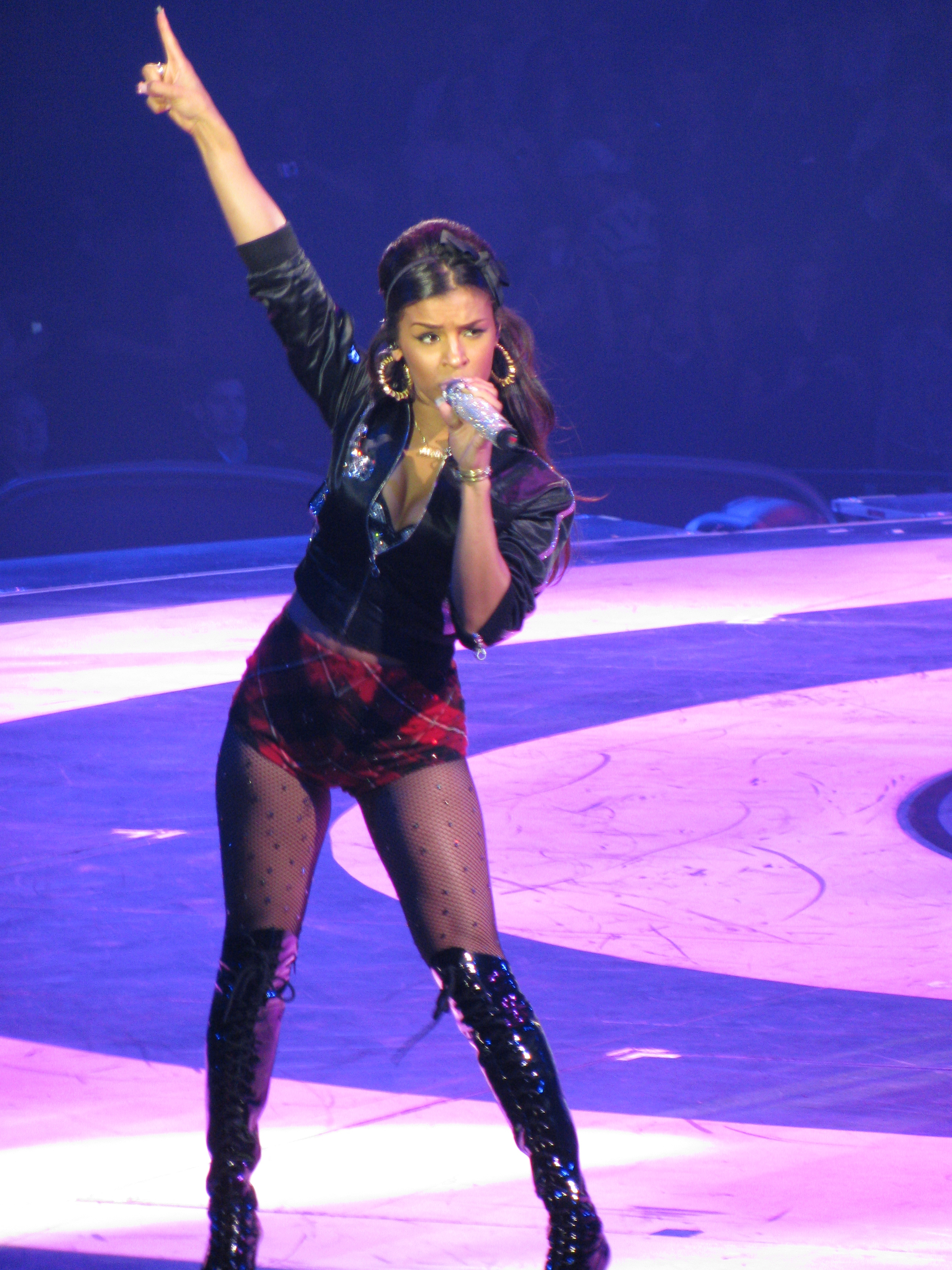 Melody Thornton durante a abertura da turnê das Pussycat Dolls com a Britney Spears.